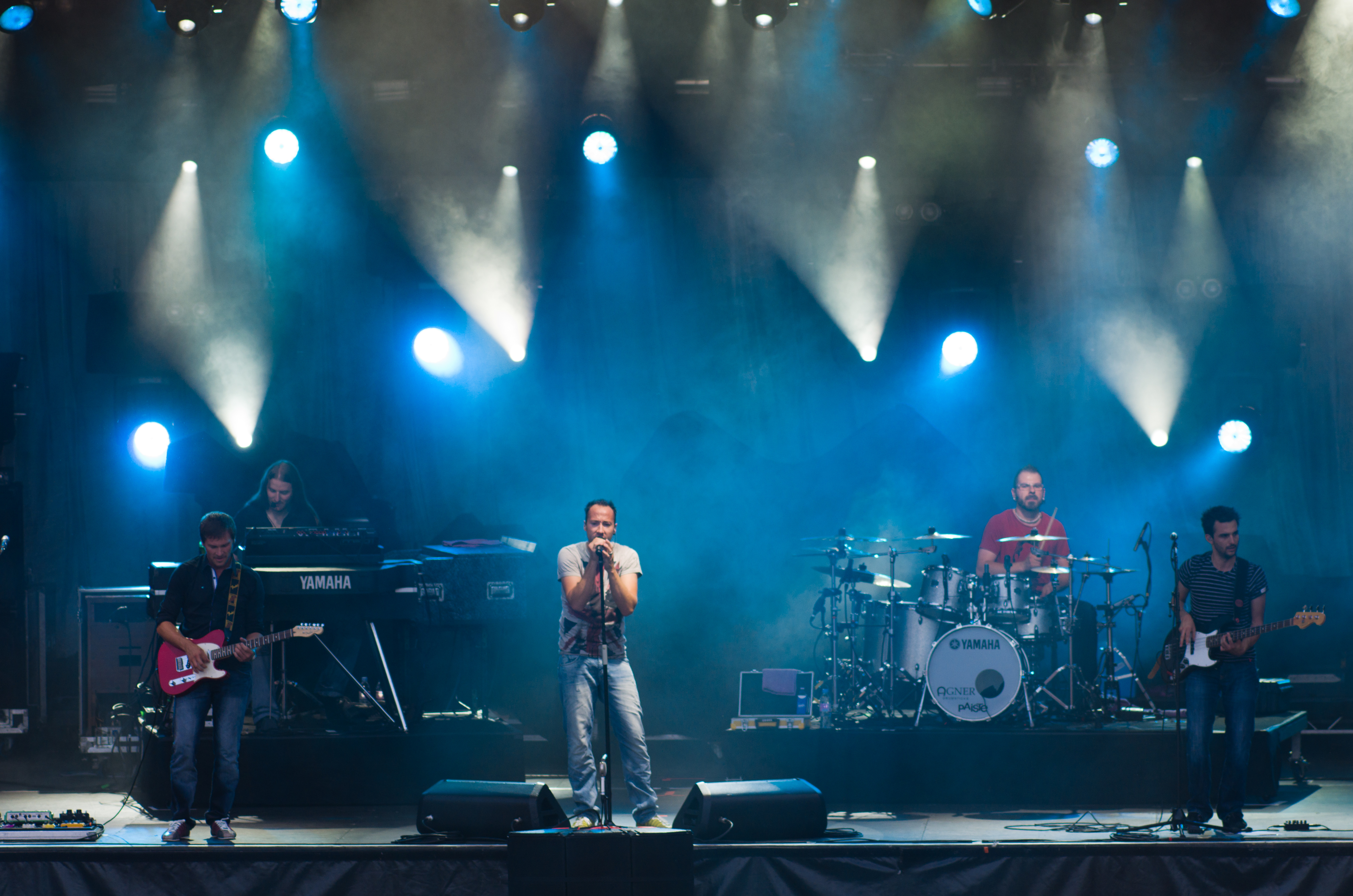 Die Schweizer Band Plüsch am Stars of Sounds Aarberg 2012